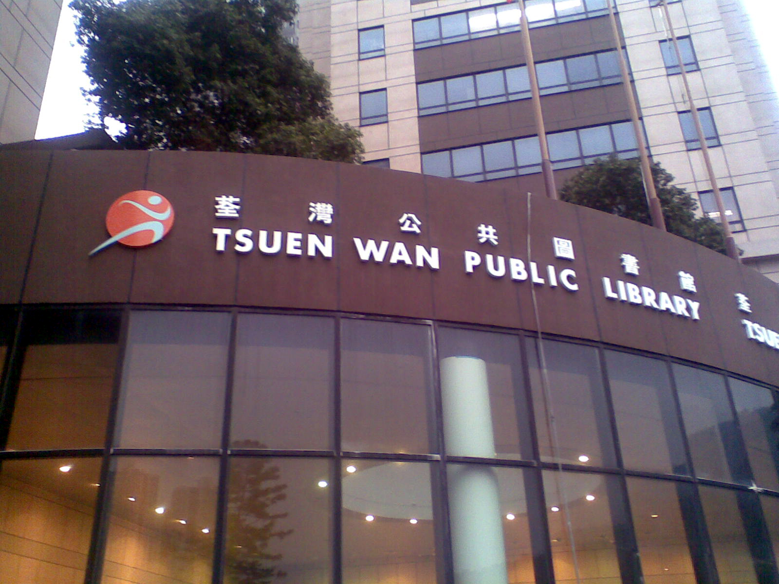 荃灣公共圖書館